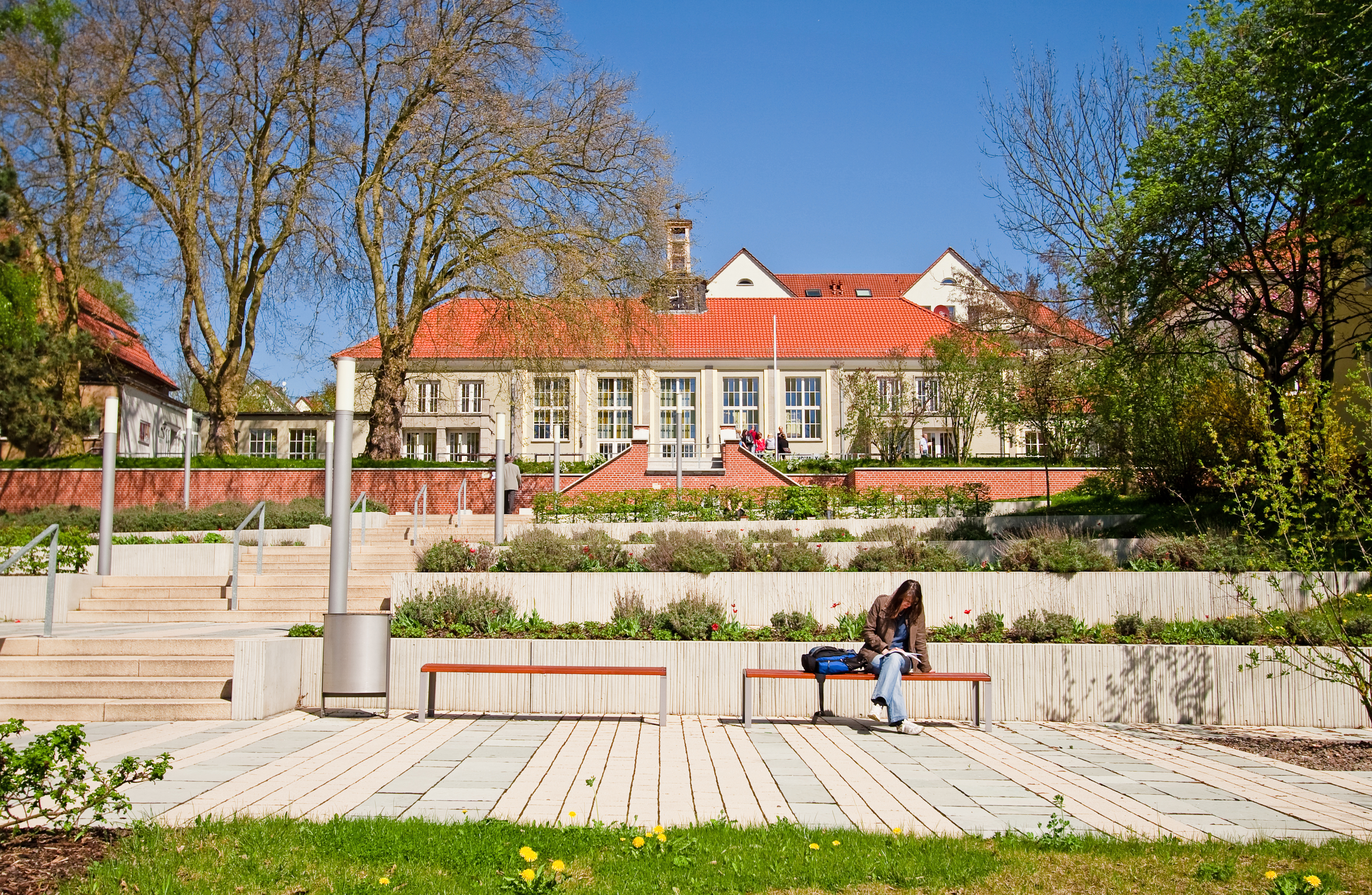 Audimax der FH Nordhausen, Blick von Haus 18